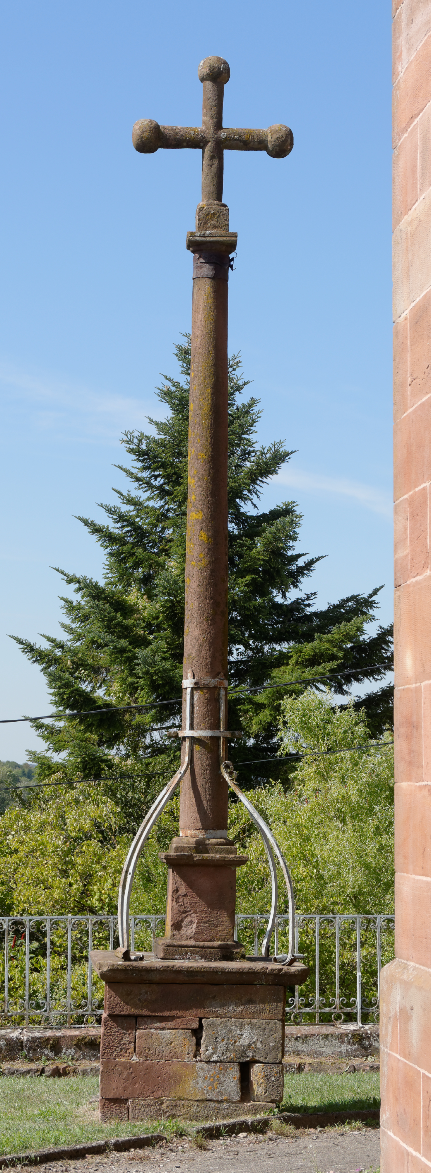 This image was uploaded as part of L'Été des villes 2015. Croix de Saulnot datée de 1723.